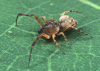 male Philoponella prominens from Okinawa.